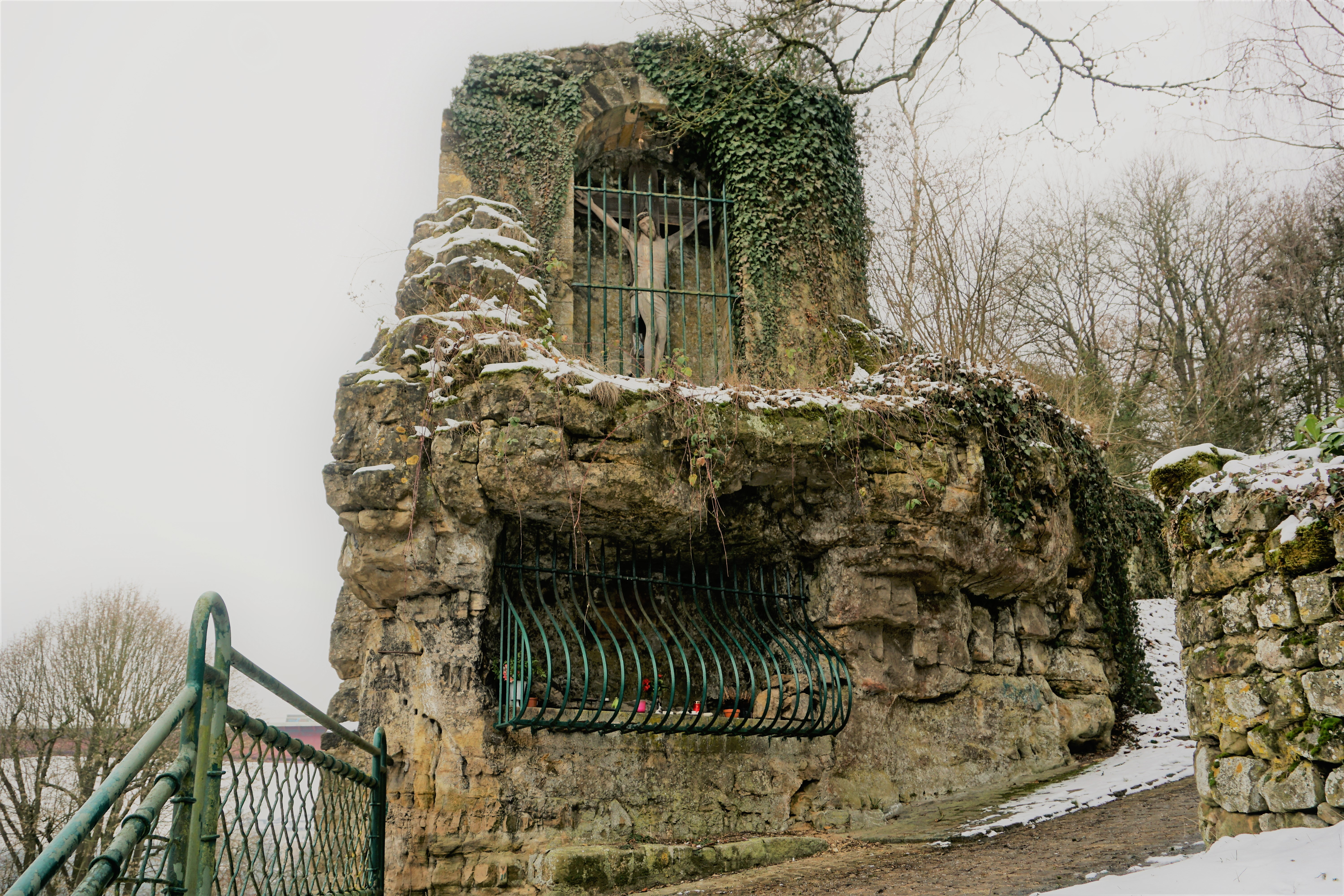 Lëtzebuerg-Lampertsbierg. D'Grott vum Péiter Onrou mat, uewendriwwer, dem "Groussen Härgott".